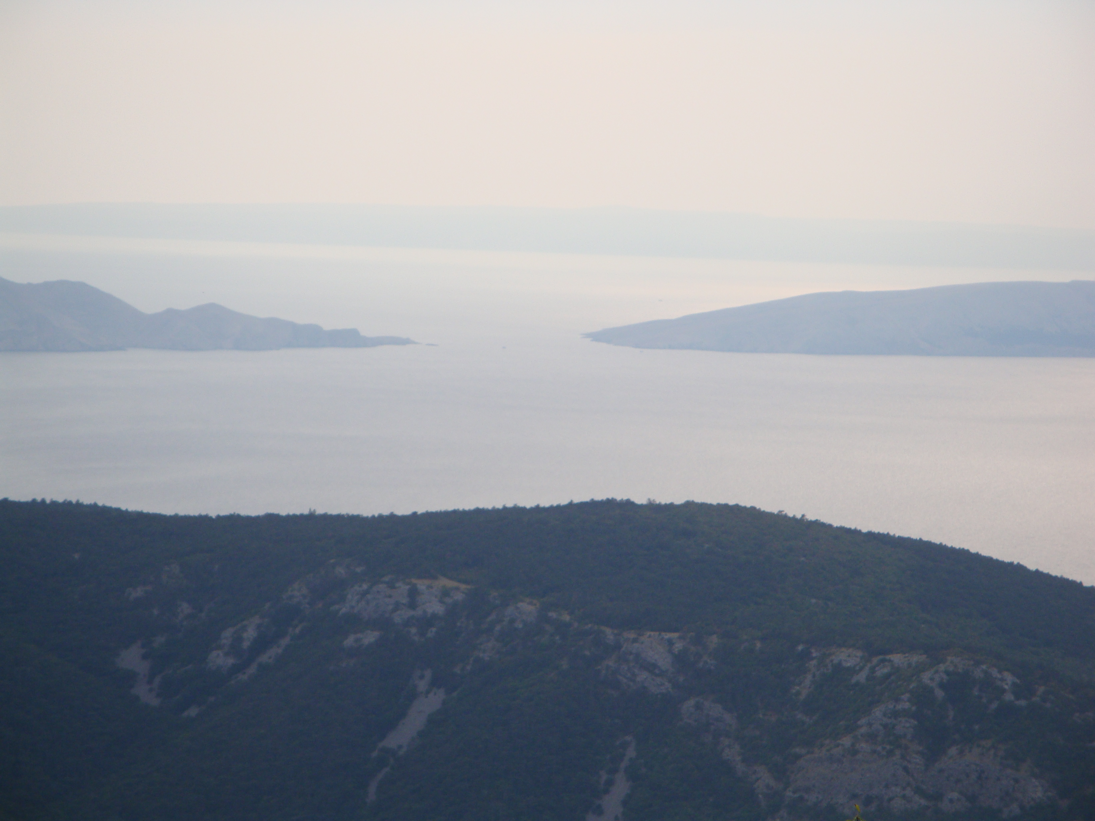 Senjska vrata med Rabom in Krkom